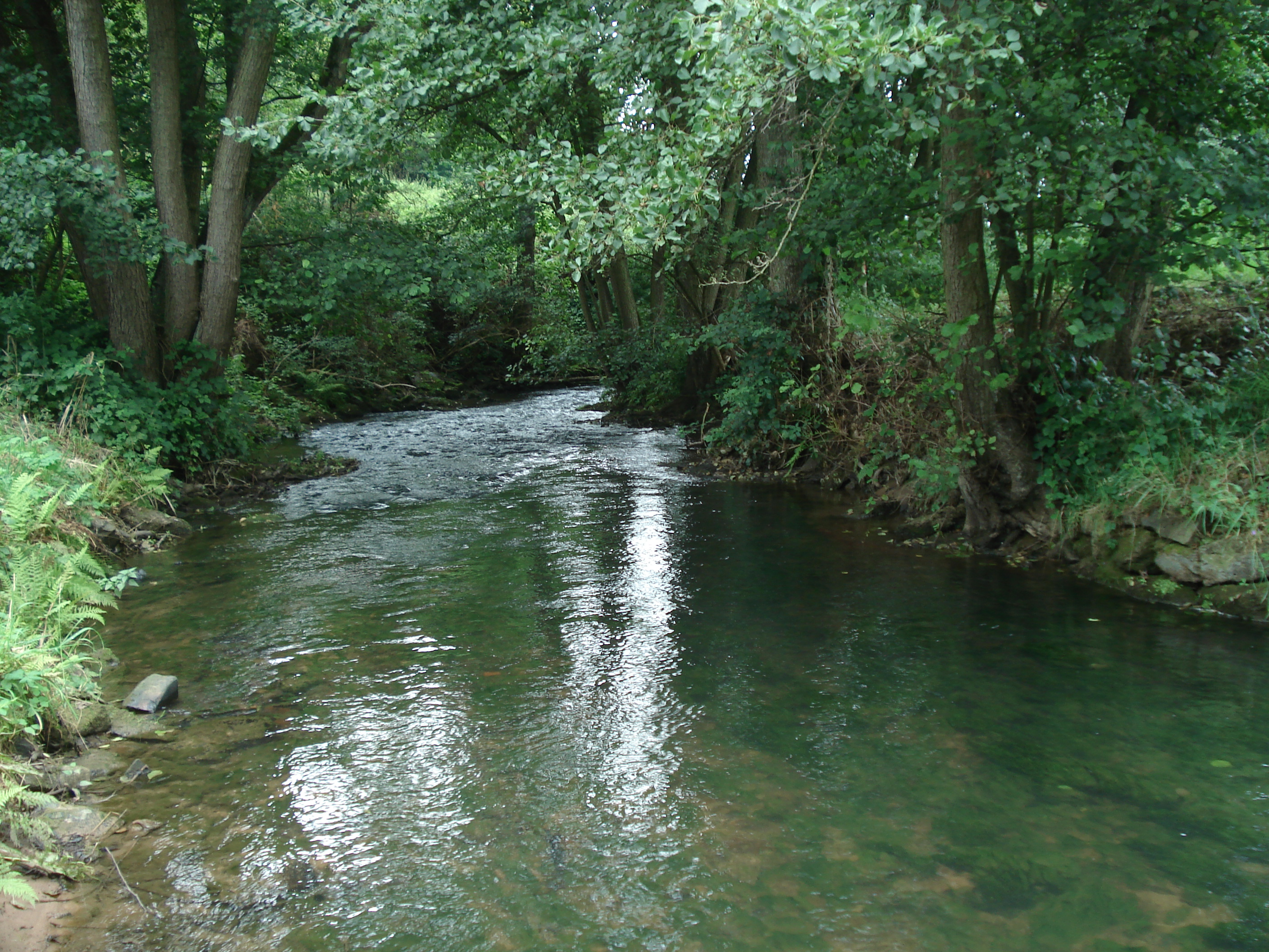 Die Elsava bei Elsenfeld